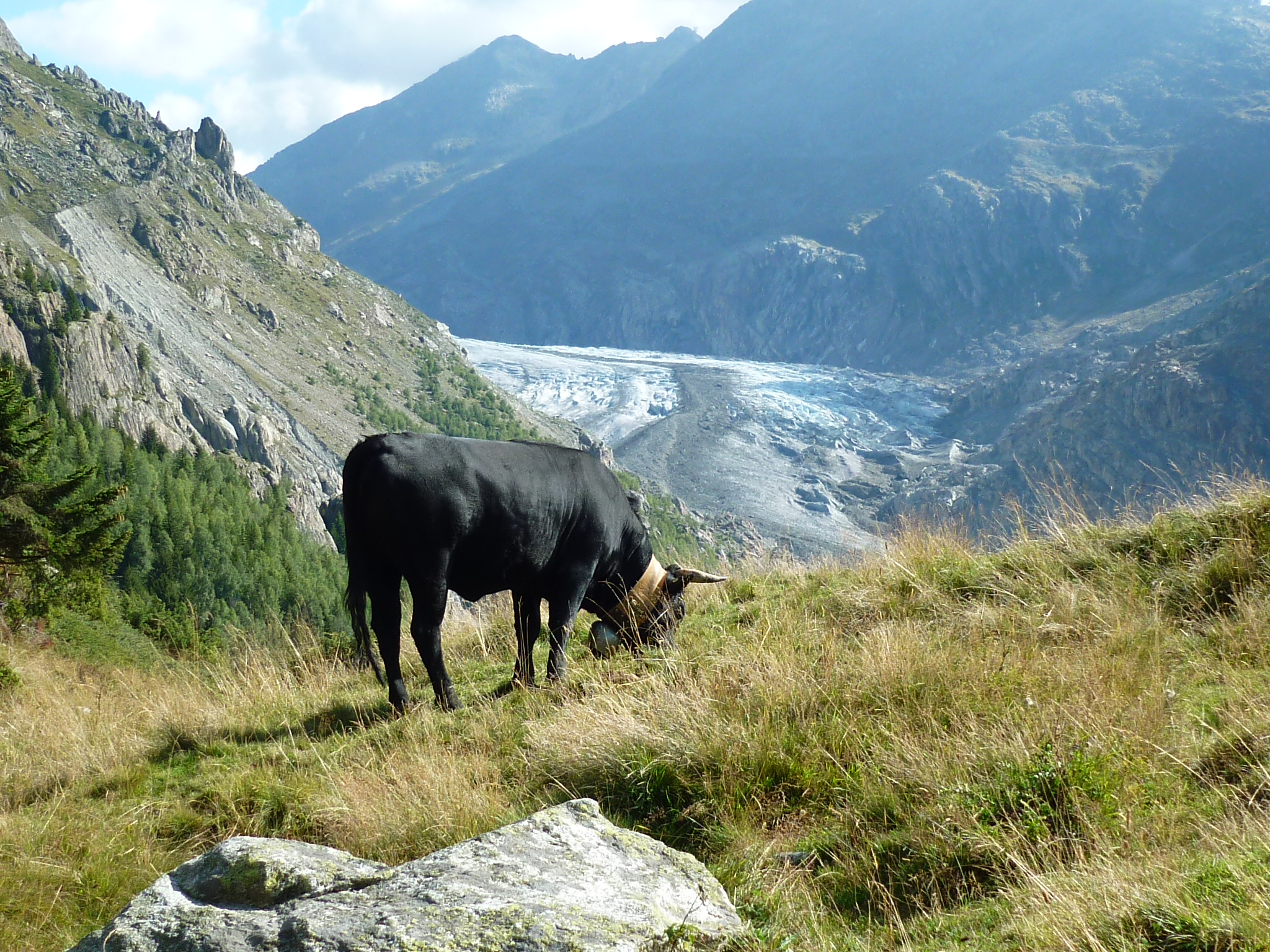 Eringer Rind beim Aletschgletscher, Schweiz